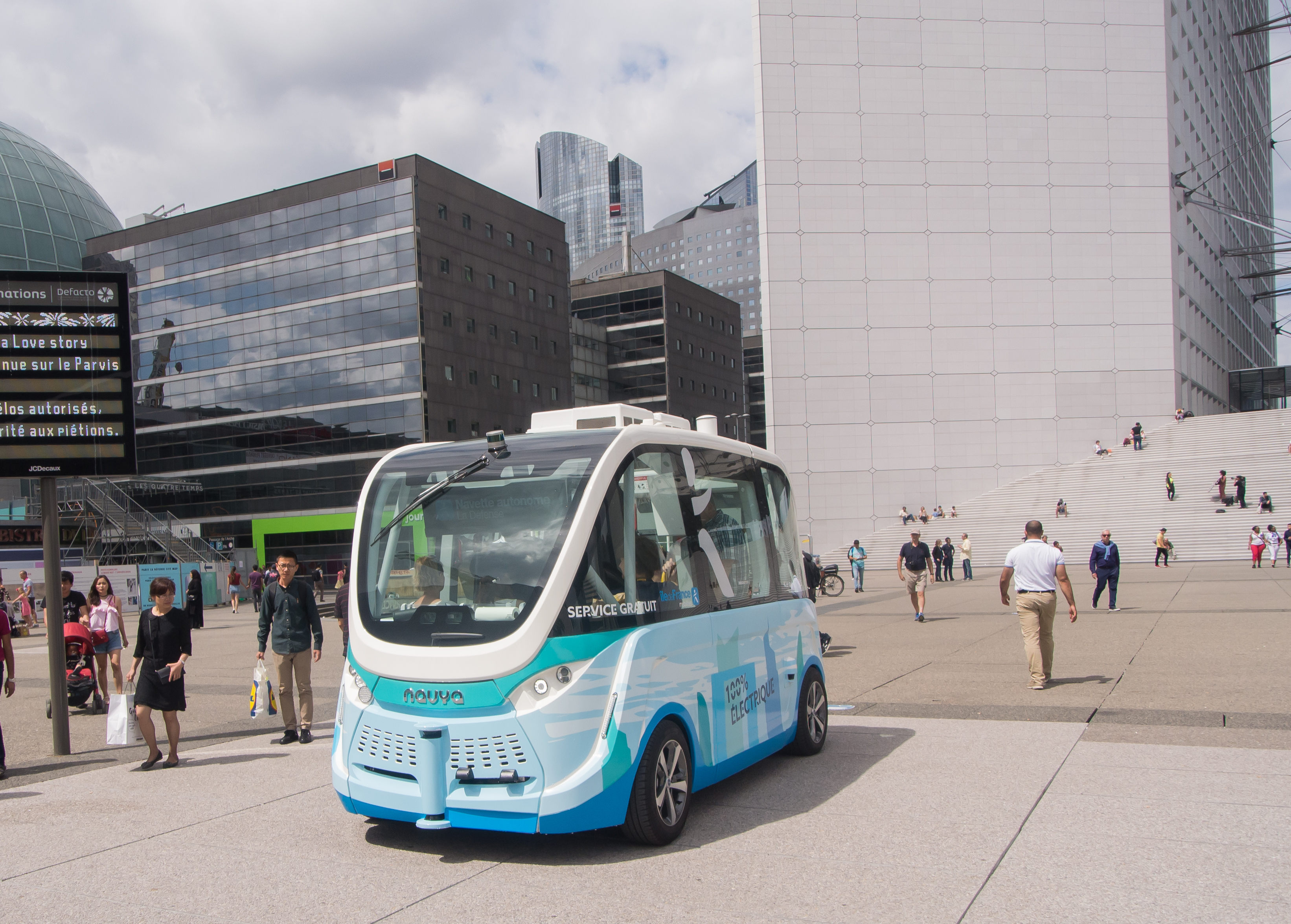 Véhicule Navya, expérimentation du STIF à la défense entre Juin 2017 et fin 2017. Photo prise en Juillet 2017